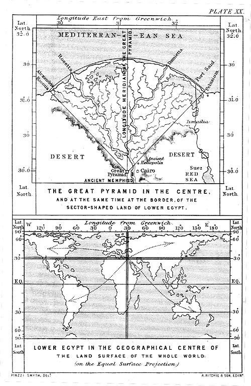 Planche 20, position géographique de la grande pyramide